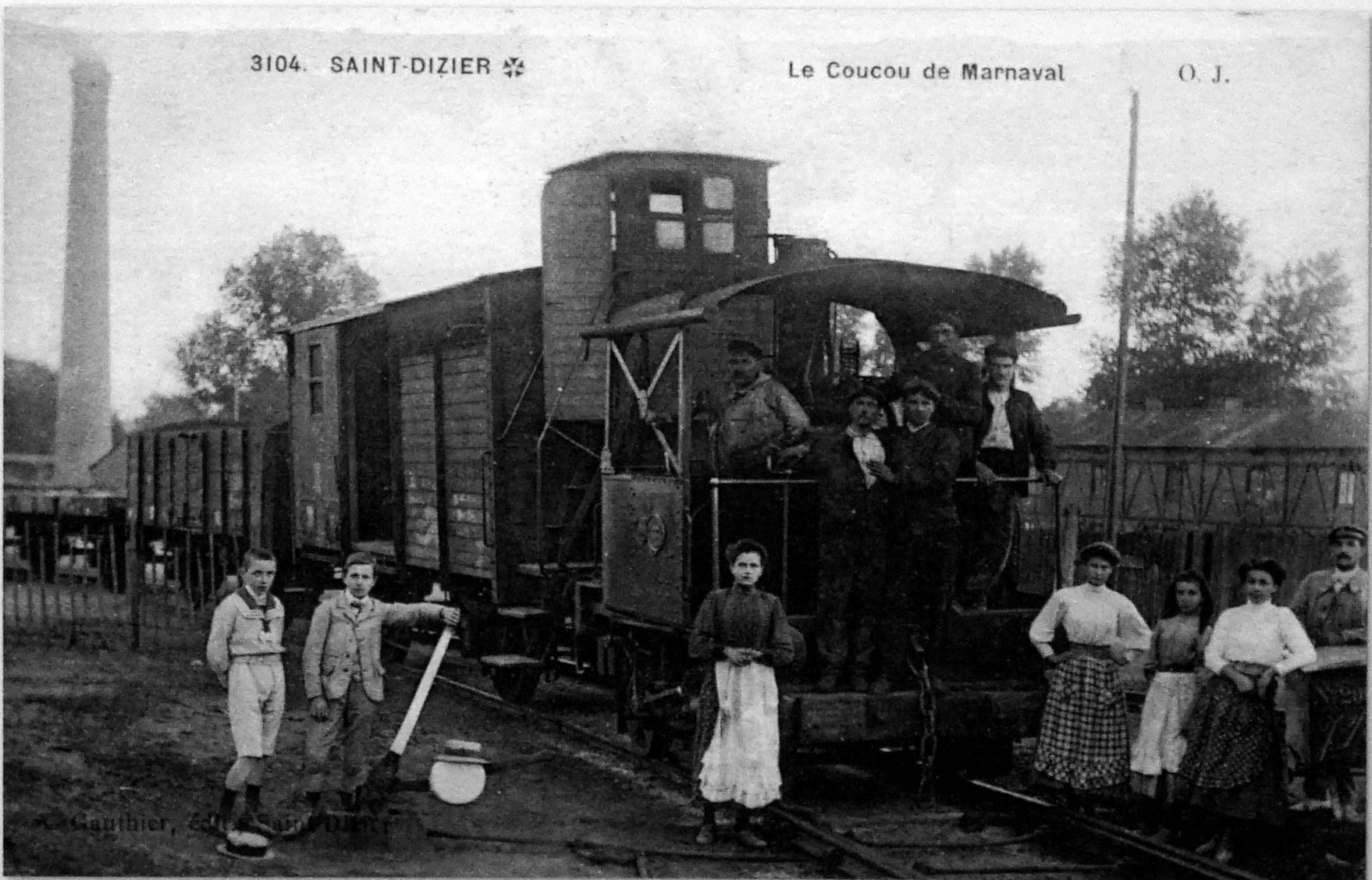 sur une vue ancienne.